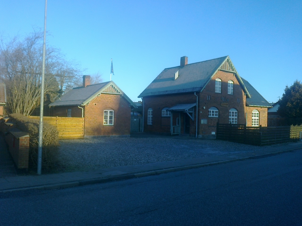 Harlev station på den nedlagte Hammelbane